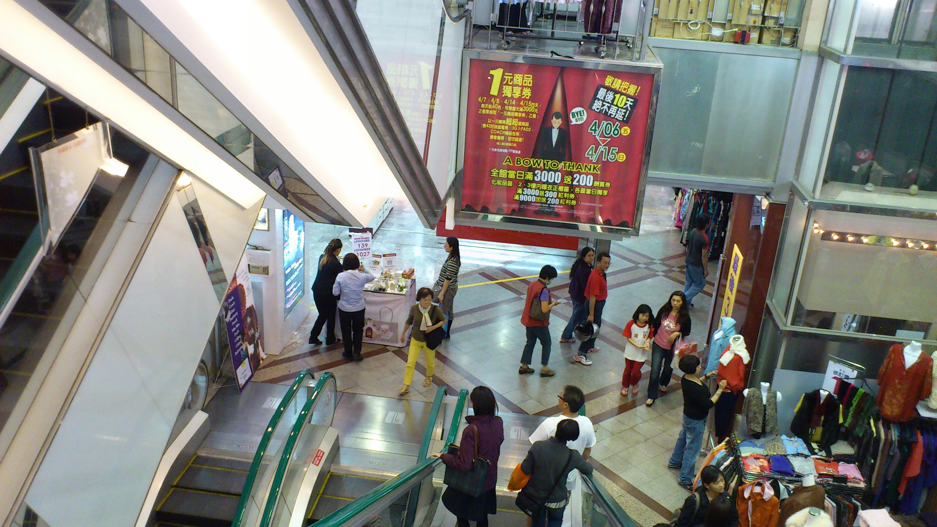 日湖百貨一樓